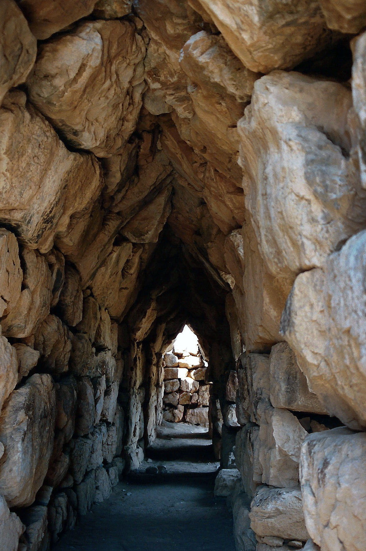 Tomada en 1991, esta foto ha sido recuperada escaneando el papel y reprocesando para eliminar algunos defectos. Tirinto fue una ciudad micénica ubicada en el Peloponeso, Grecia. Su mayor espledor correspondió al periodo entre 1400 y 1200 a.C., al que corresponden su palacio, sus pasadizos y dos anillos de murallas ciclópeas, en las que se encuentra la galería de la fotografía.